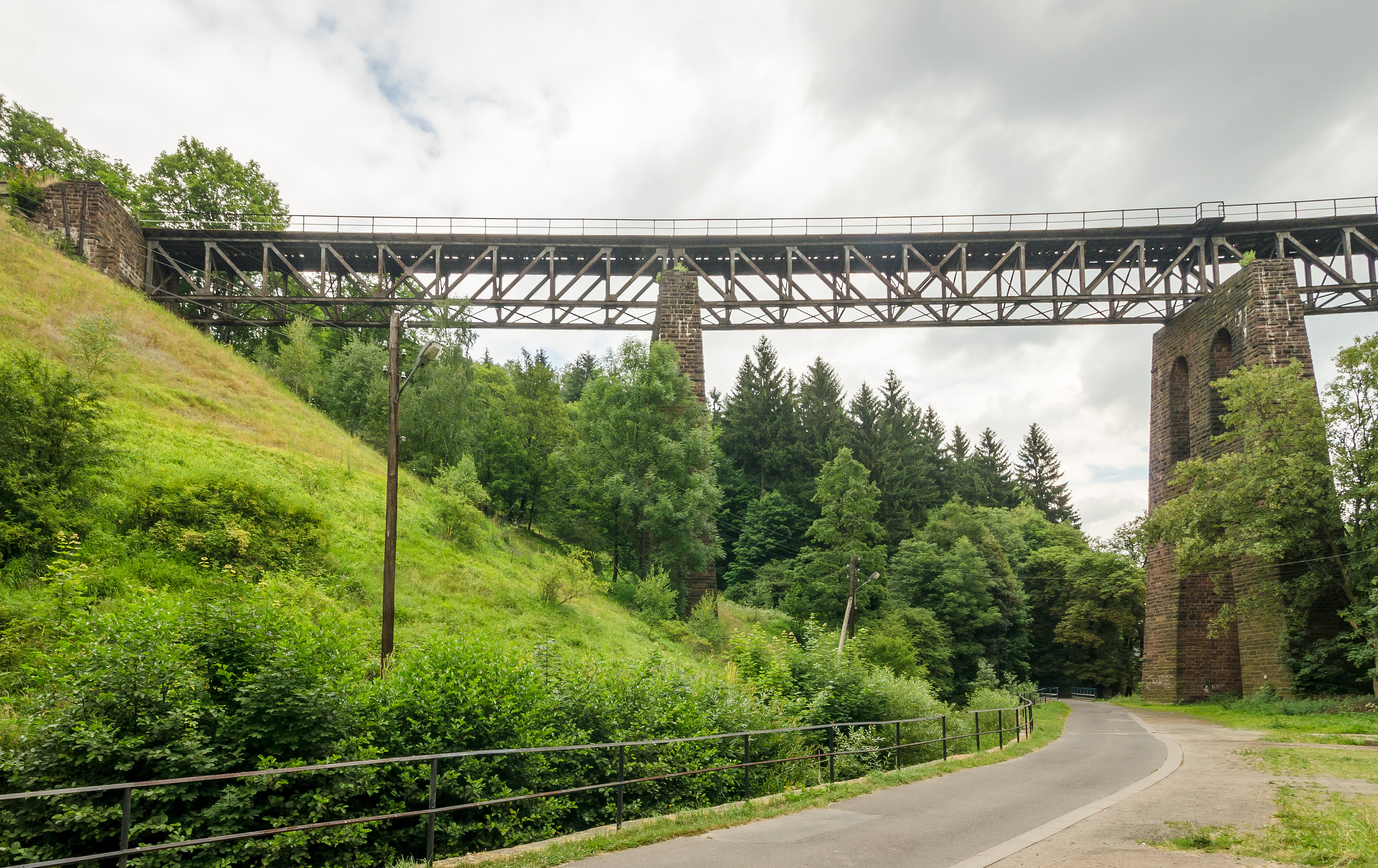 Nowa Ruda - "Czarny Wiadukt" This photo of Lower Silesian Voivodeship was taken during Wikiexpedition 2013 set up by Wikimedia Polska Association. You can see all photographs in category Wikiekspedycja 2013.